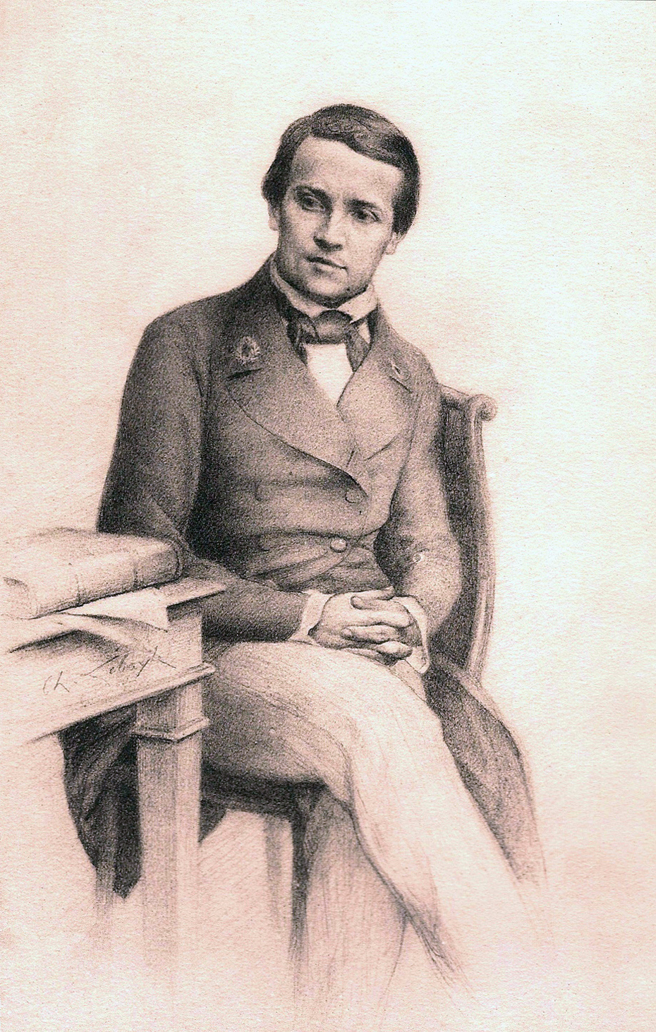 Dessin de Lebayle représentant Louis Pasteur en 1845 à l'Ecole Normale Supérieure, d'après un daguerréotype.